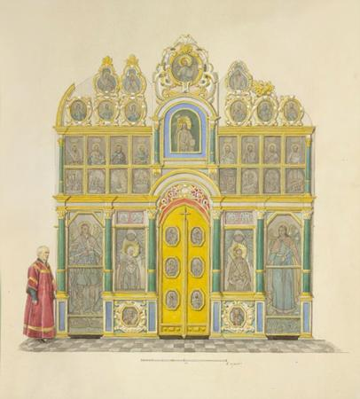 Иконостас Крестовоздвиженской церкви Теремного дворца 2 половины XVII в. Иконы выполнены в технике аликации мастером оружейной палаты Василием Познанским